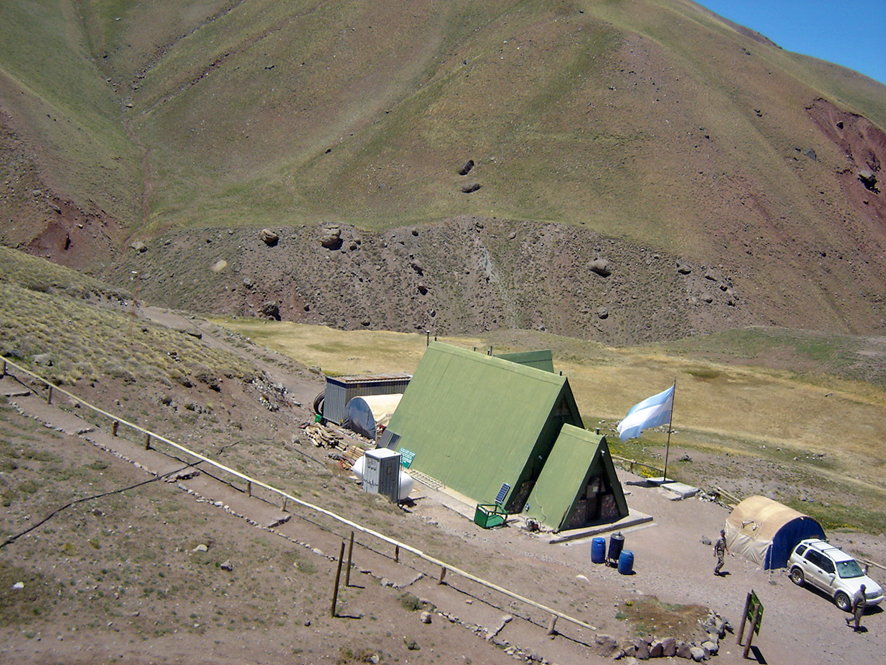 Parque Provincial Aconcagua, Mendoza, ARG